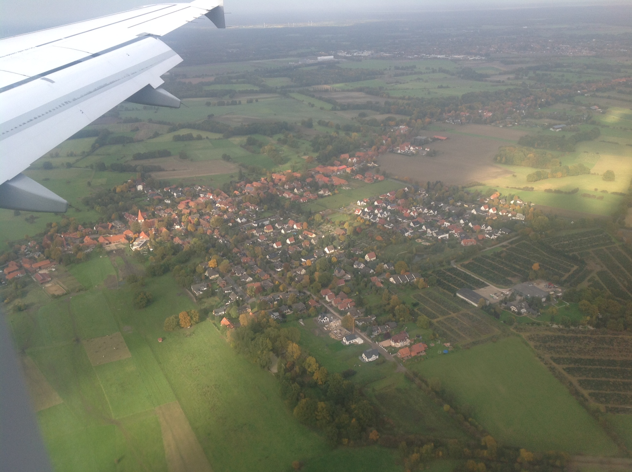 Luftbild des Ortes Kircher Bauernschaft bei Hannover